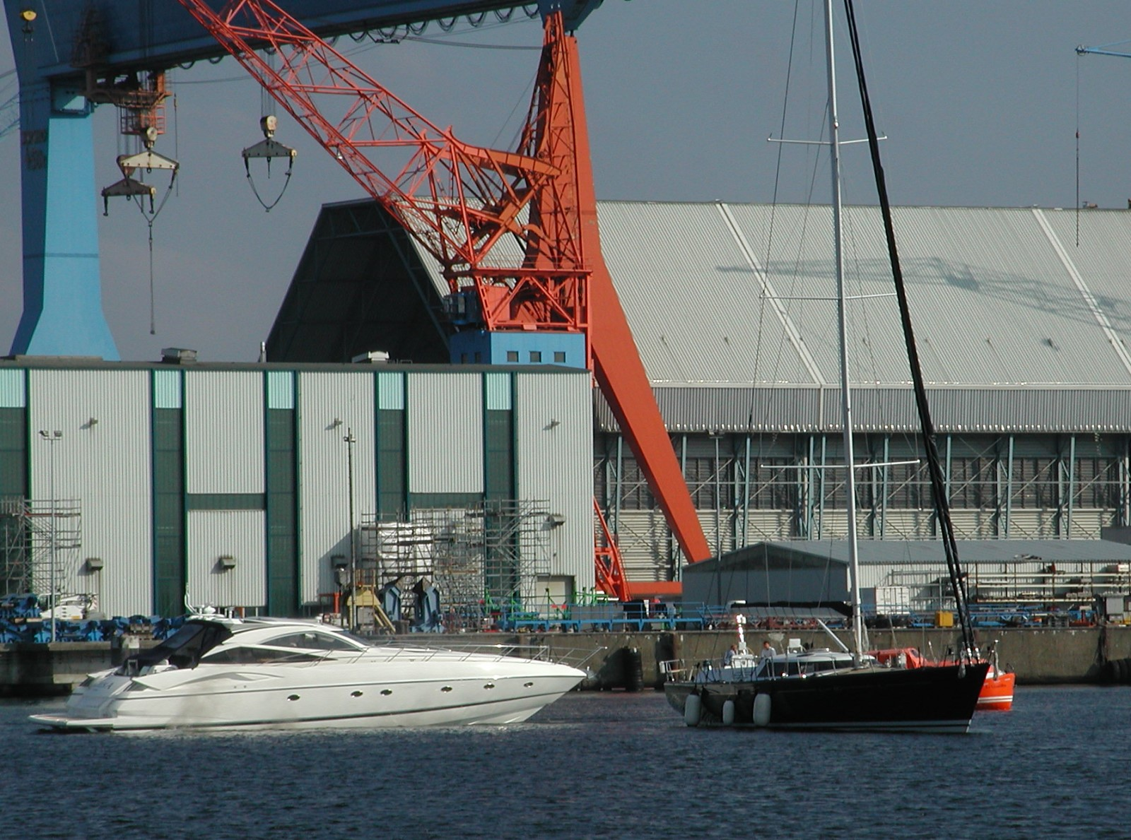 Mega-Yacht Le Grand Bleu: Tochterboote Bellatrix (Segelyacht) und Sirius A (Motoryacht) im Kieler Hafen.